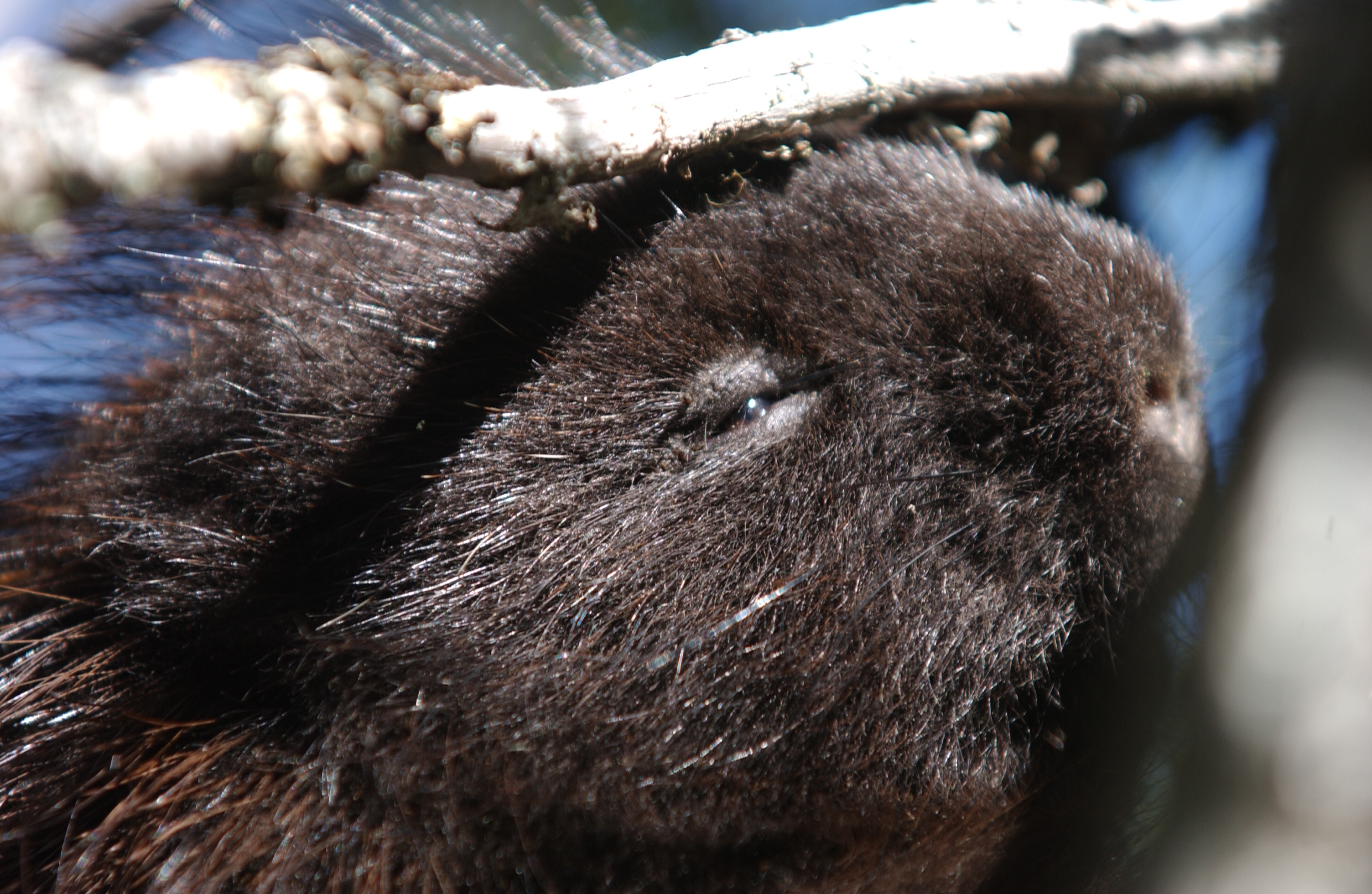 En été, trop chaud pour se déplacer, il est resté accroché à son tronc d'arbre, permettant ainsi de le voir de très près.